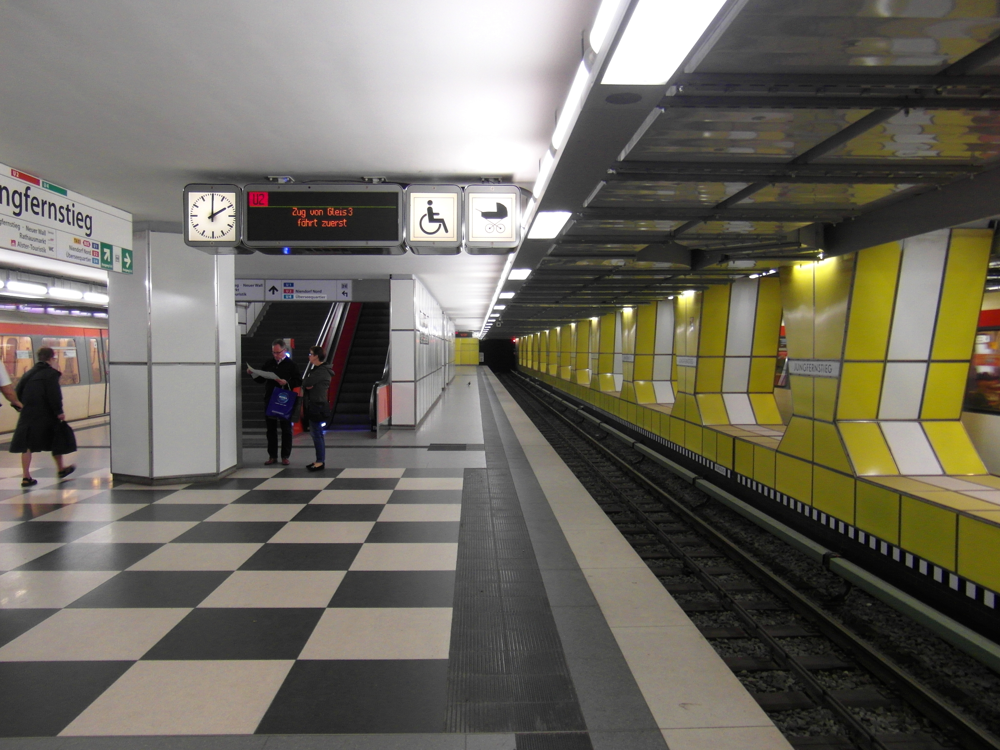 U-Bahnhof Jungfernstieg in Hamburg - Bahnsteige der Linien U2 und U4